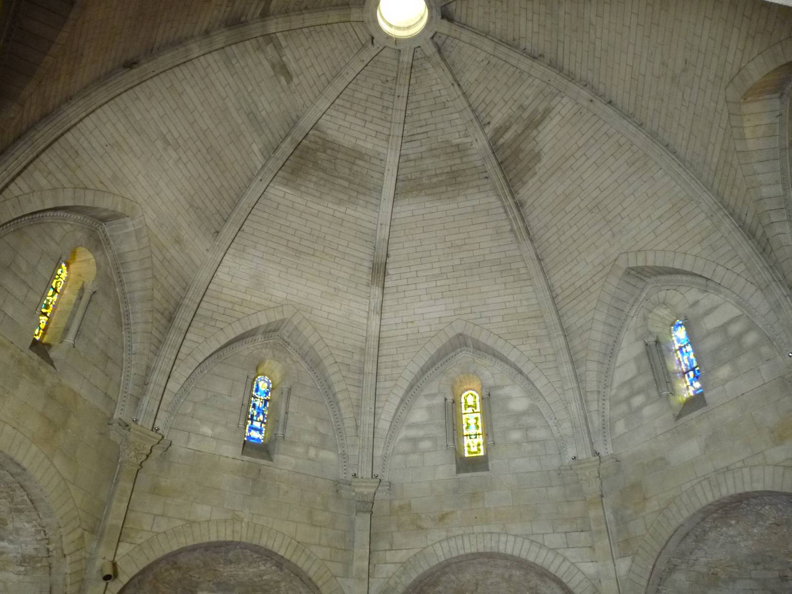 église de St-Michel (16), France